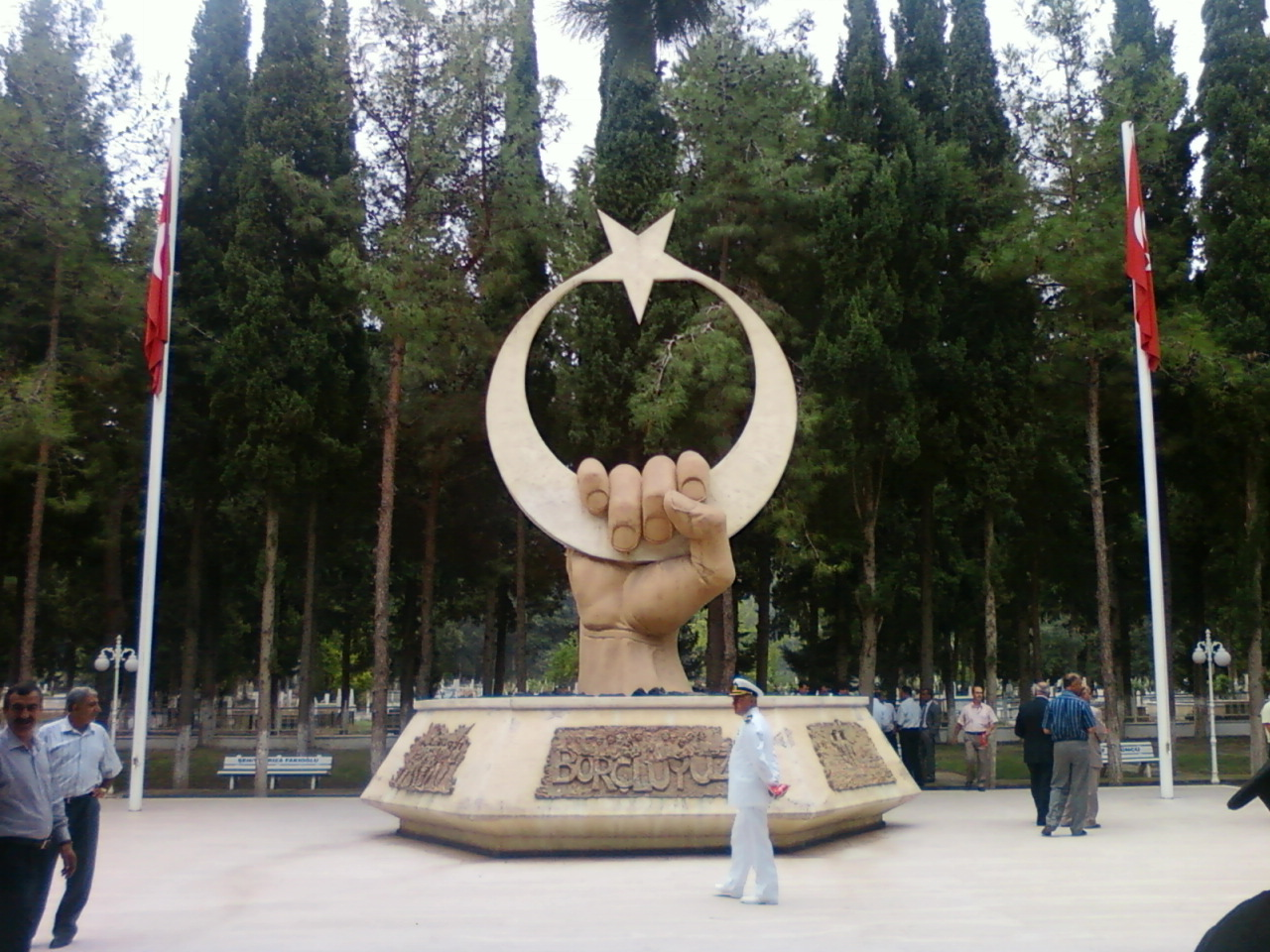 İskenderun şehitlik anıtı